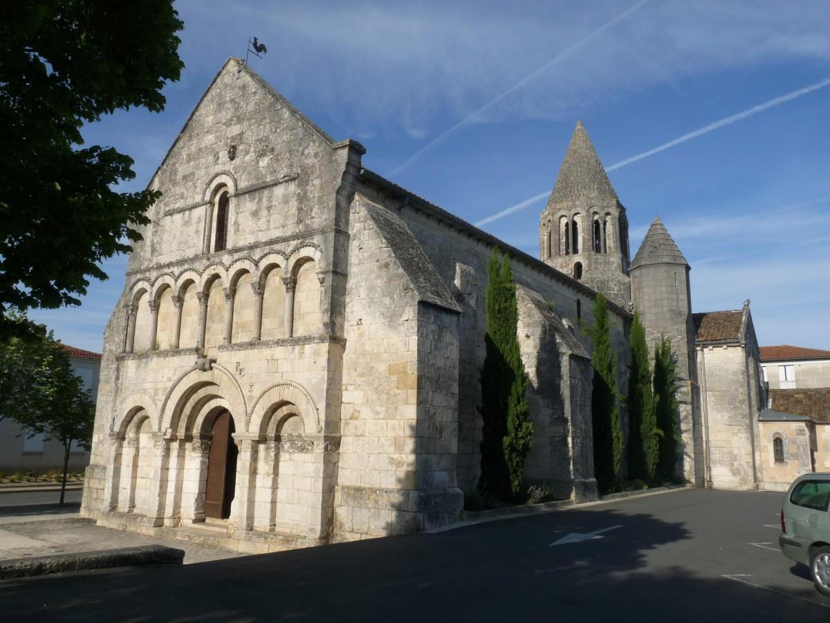 Eglise de La Couronne (Charente, France)